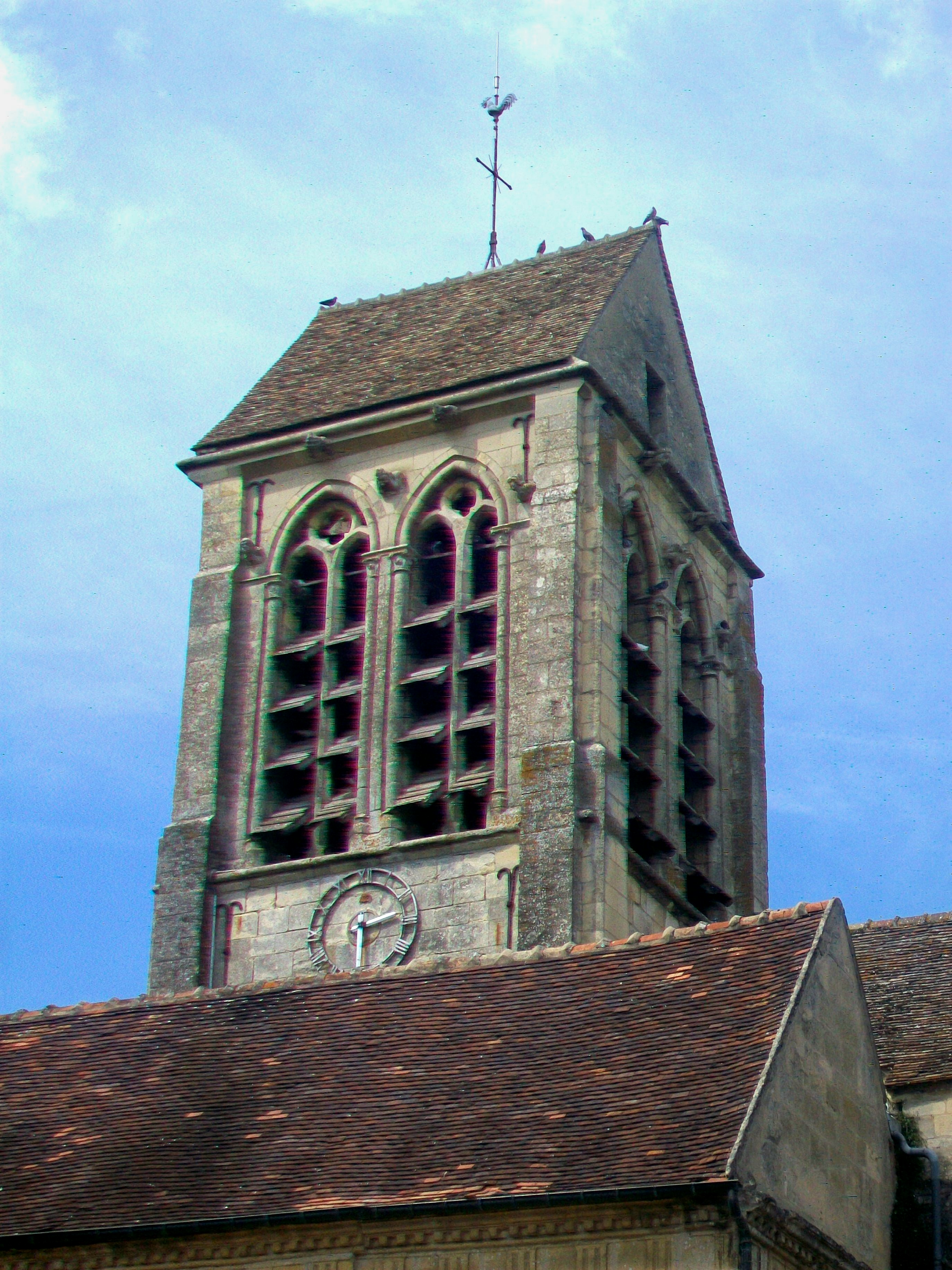 Vue rapprochée du clocher.